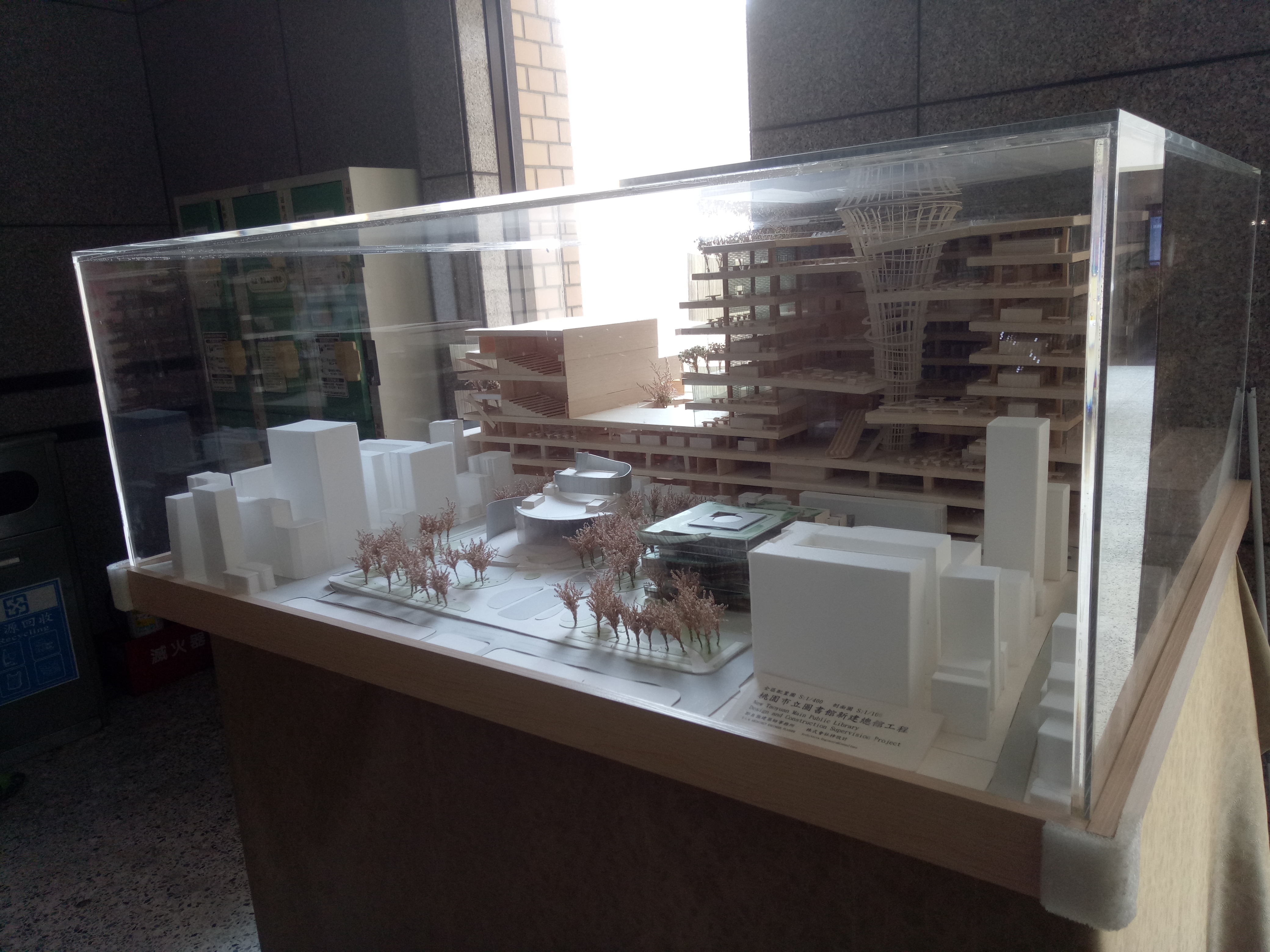 桃園市立圖書館總館新建工程 建築模型